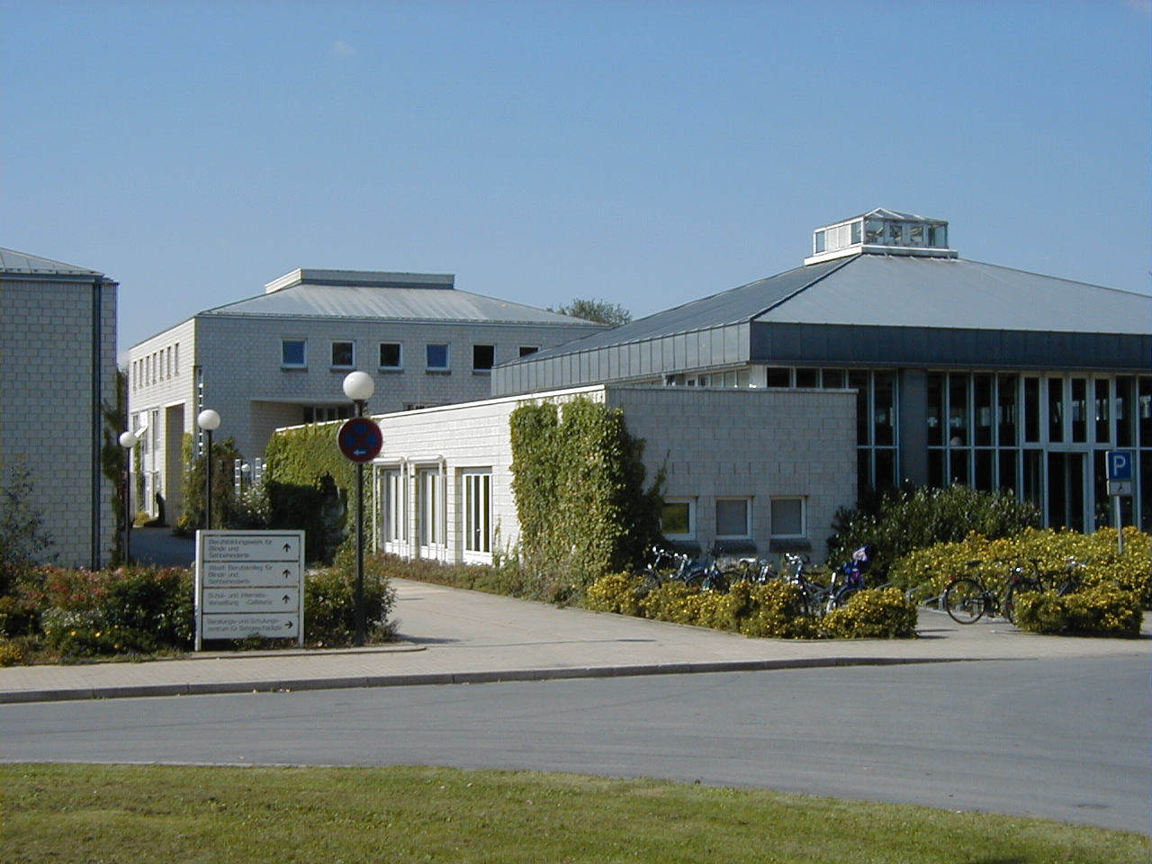 BBW Soest